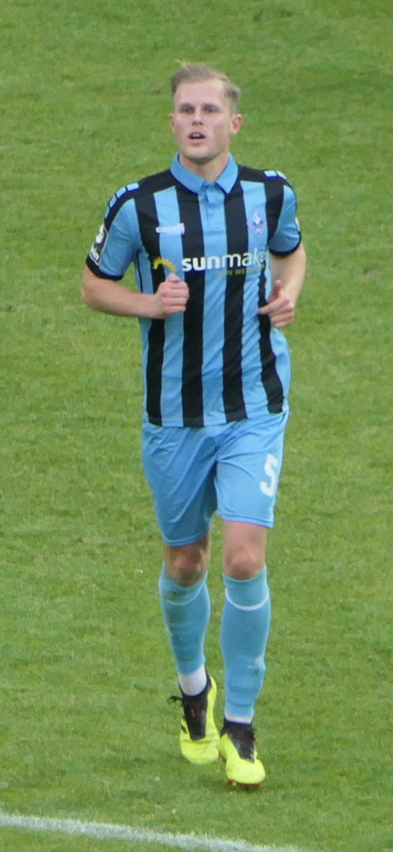 Der Fussballprofi Marcel Seegert im Trikot vom SV Waldhof Mannheim beim Heimspiel gegen Eintracht Braunschweig am 08.12.2019.